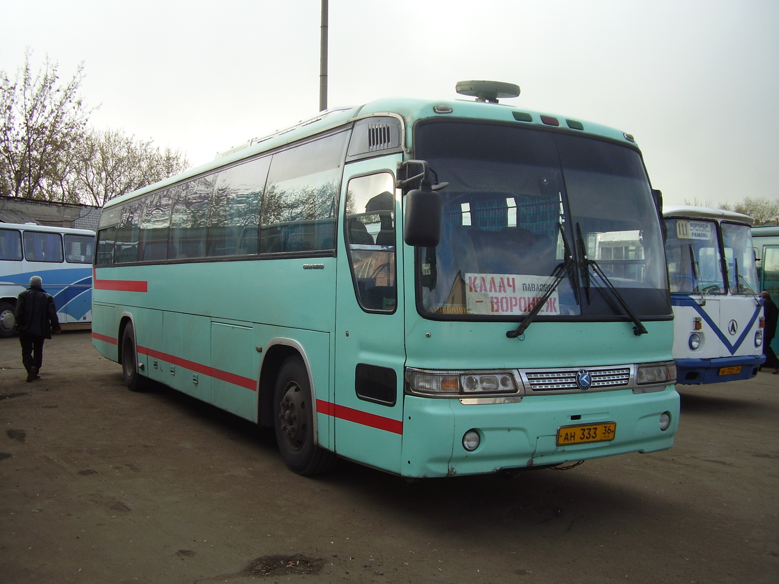 Kia_Granbird_в Воронеже на маршруте Калач--Воронеж